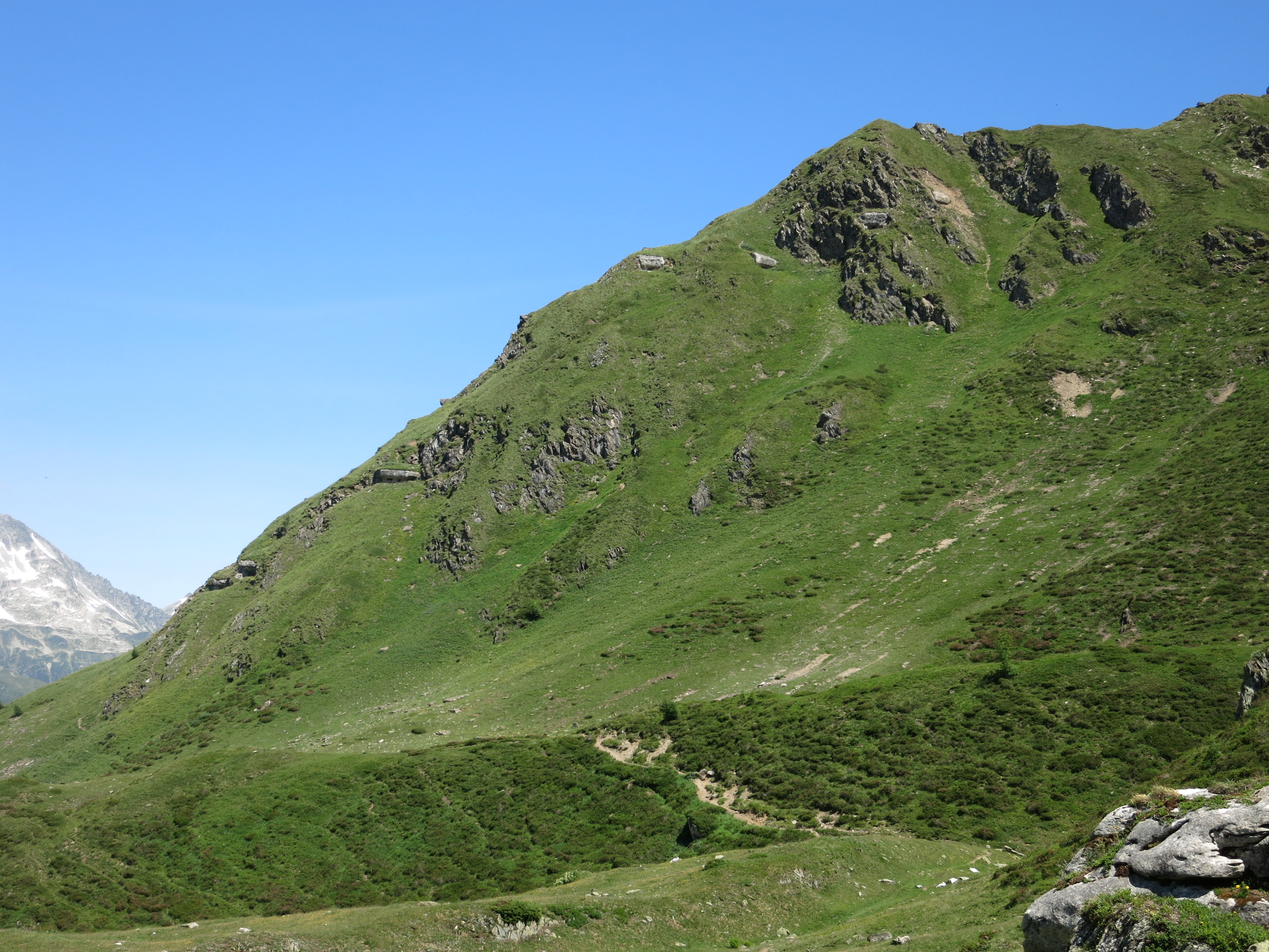 Artilleriewerk Grandinagia, Bedretto TI, Schweiz